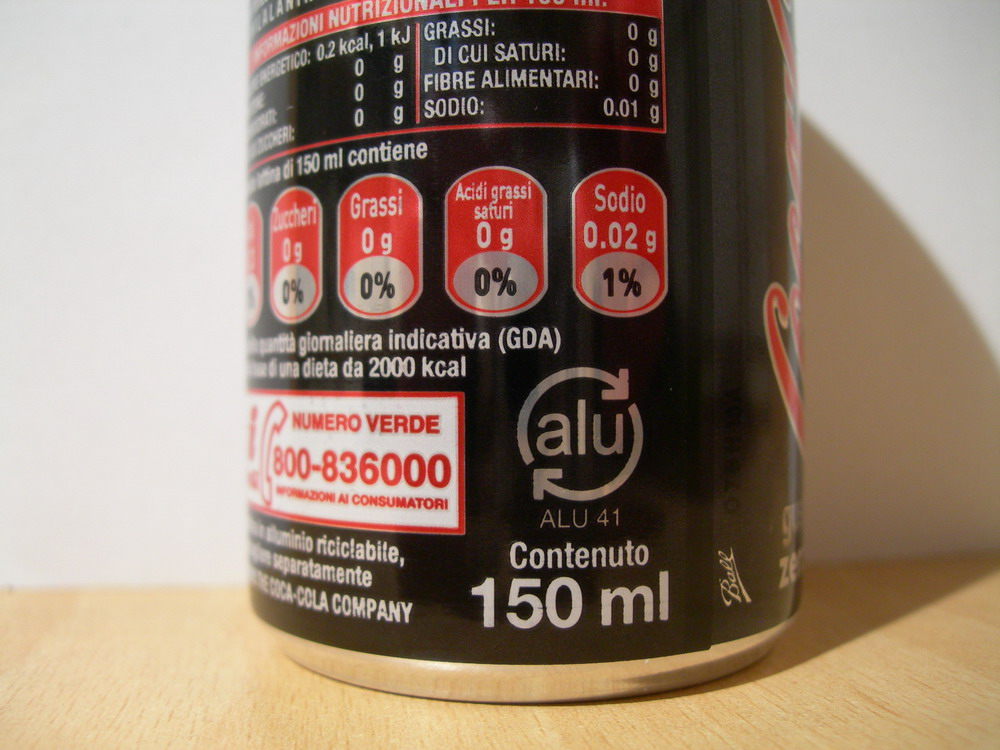 Lattina promozionale di Coca cola Zero.